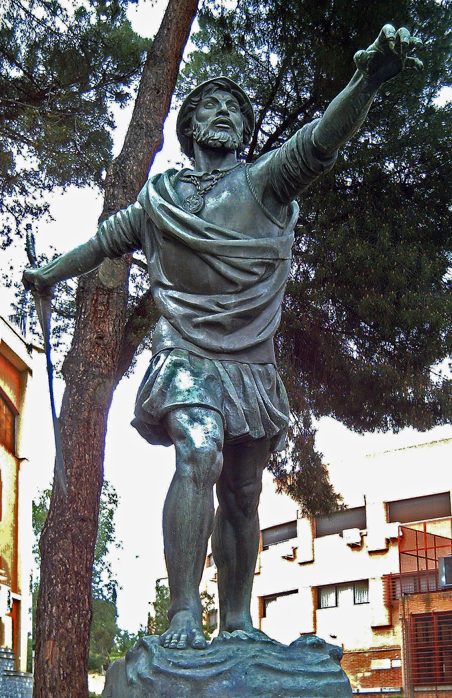 Depicted person: Vasco Núñez de Balboa